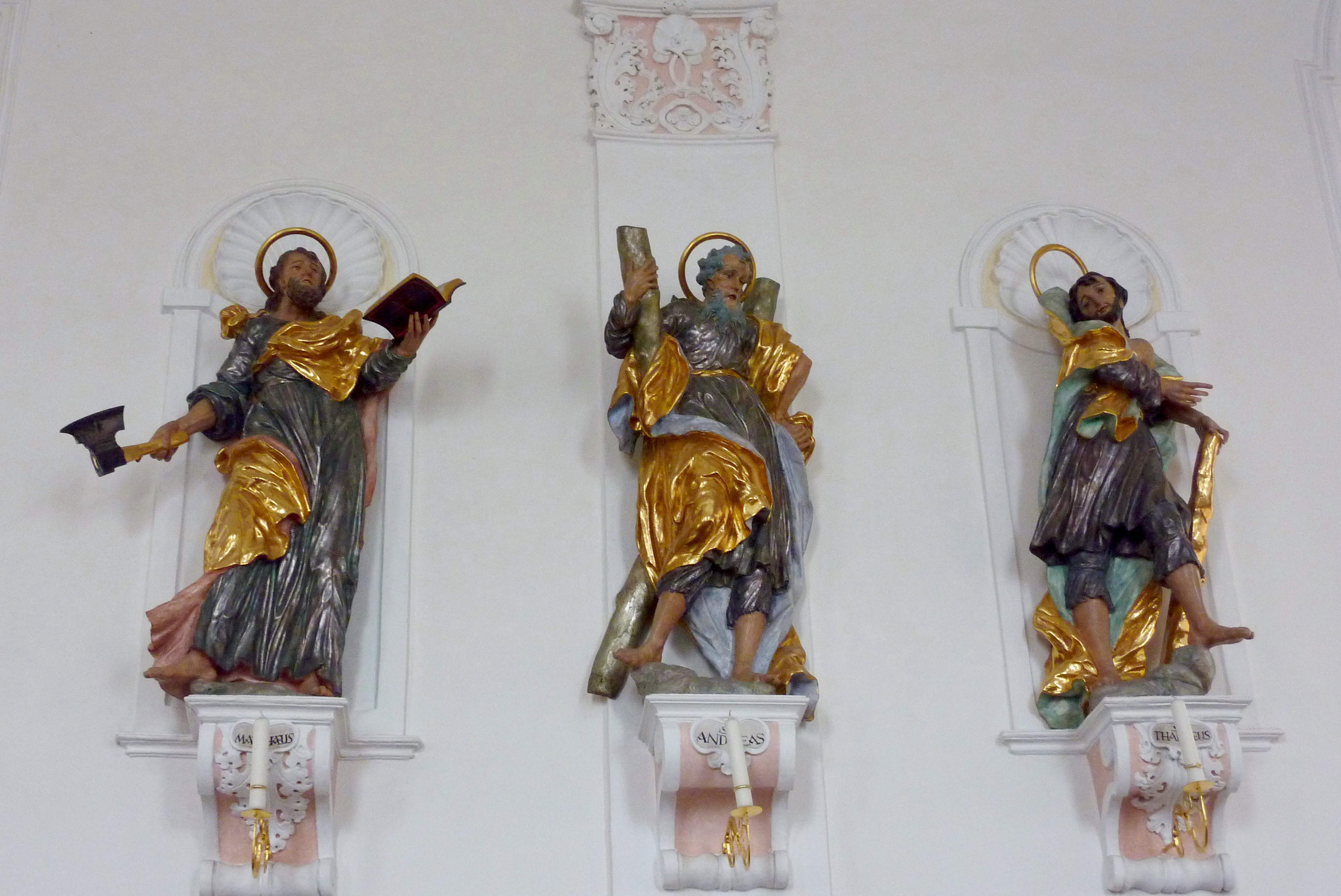 Katholische Pfarrkirche St. Martin in Holzheim bei Dillingen an der Donau, Apostelfiguren (Matthias, Andreas, Judas Thaddäus) aus der Kapelle St. Sebastian (Holzheim), aus dem Jahr 1722, von Stephan Luidl